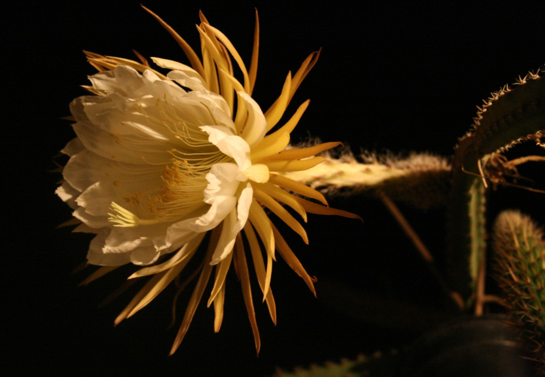 Selenicereus grandiflorus (Hylocereeae; Cactaceae; Planta) kaktusz virága